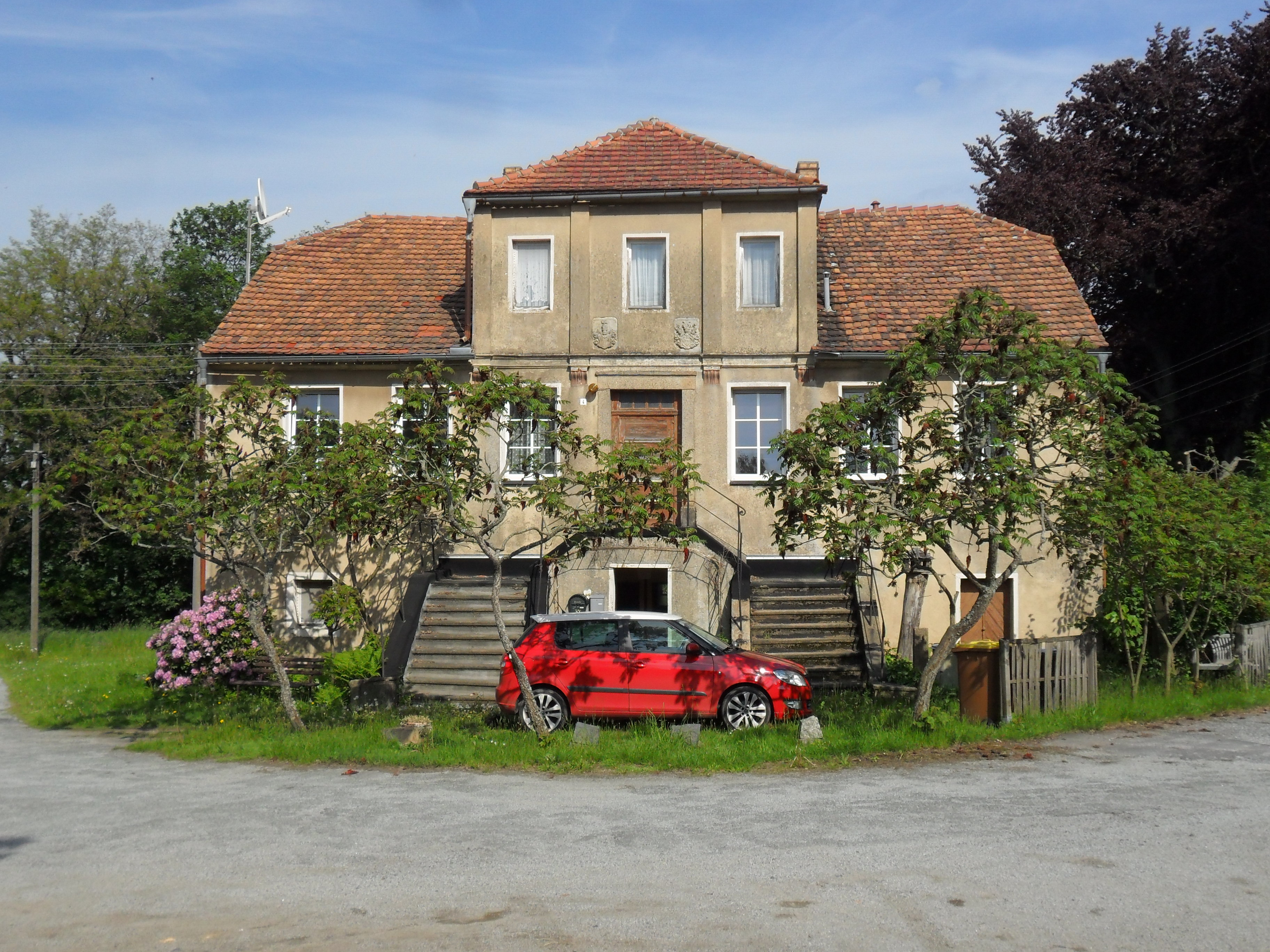 Altes Herrenhaus von Jauernick